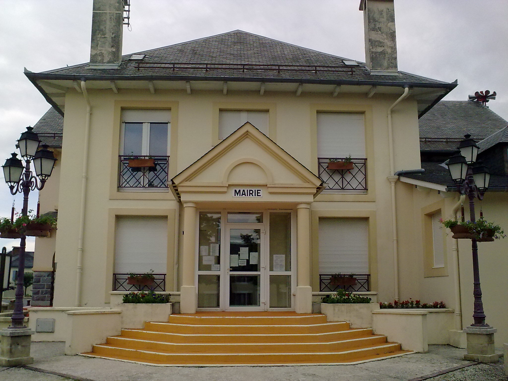 Capvern